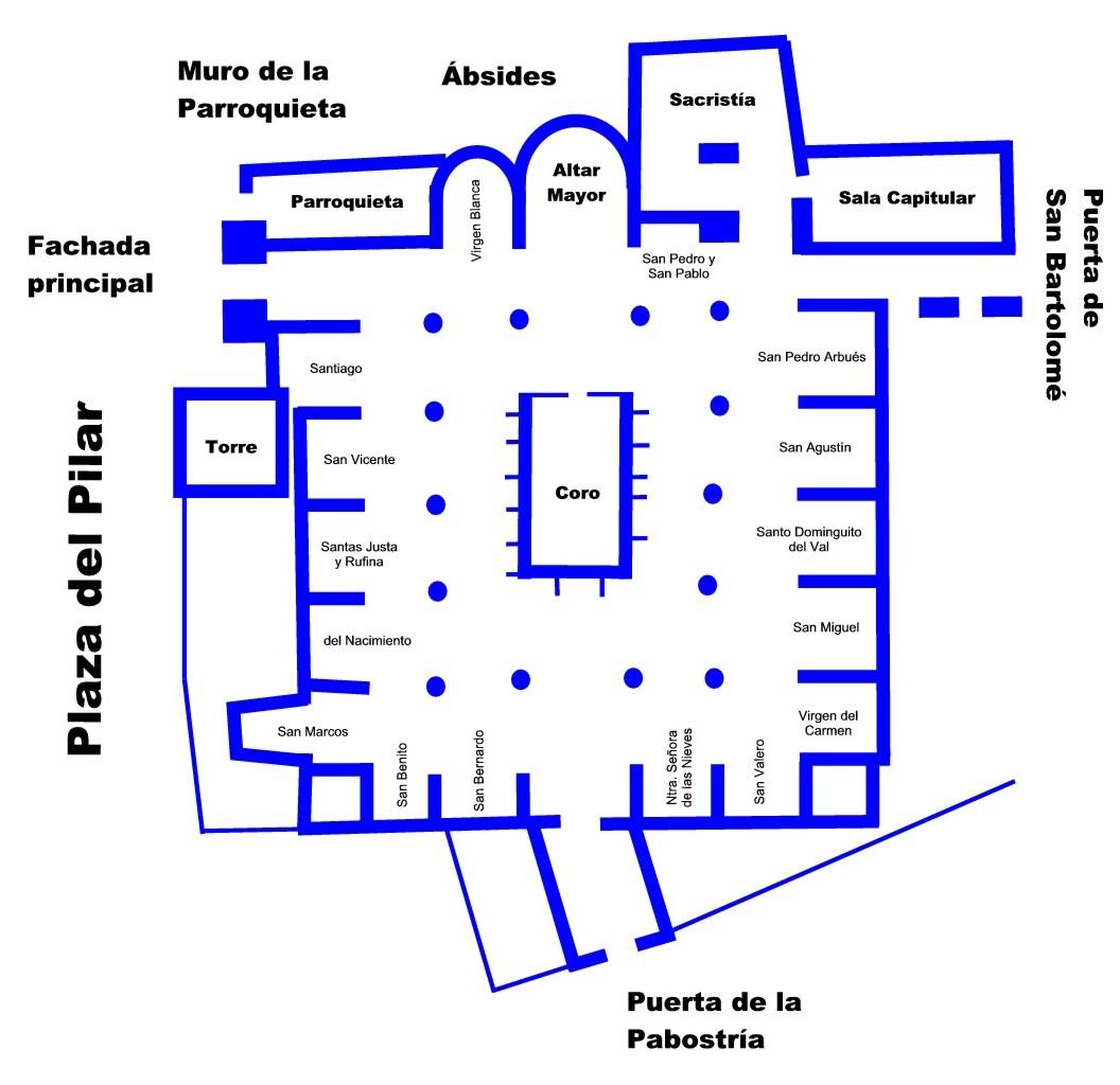 Zaragoza - La Seo - Plano